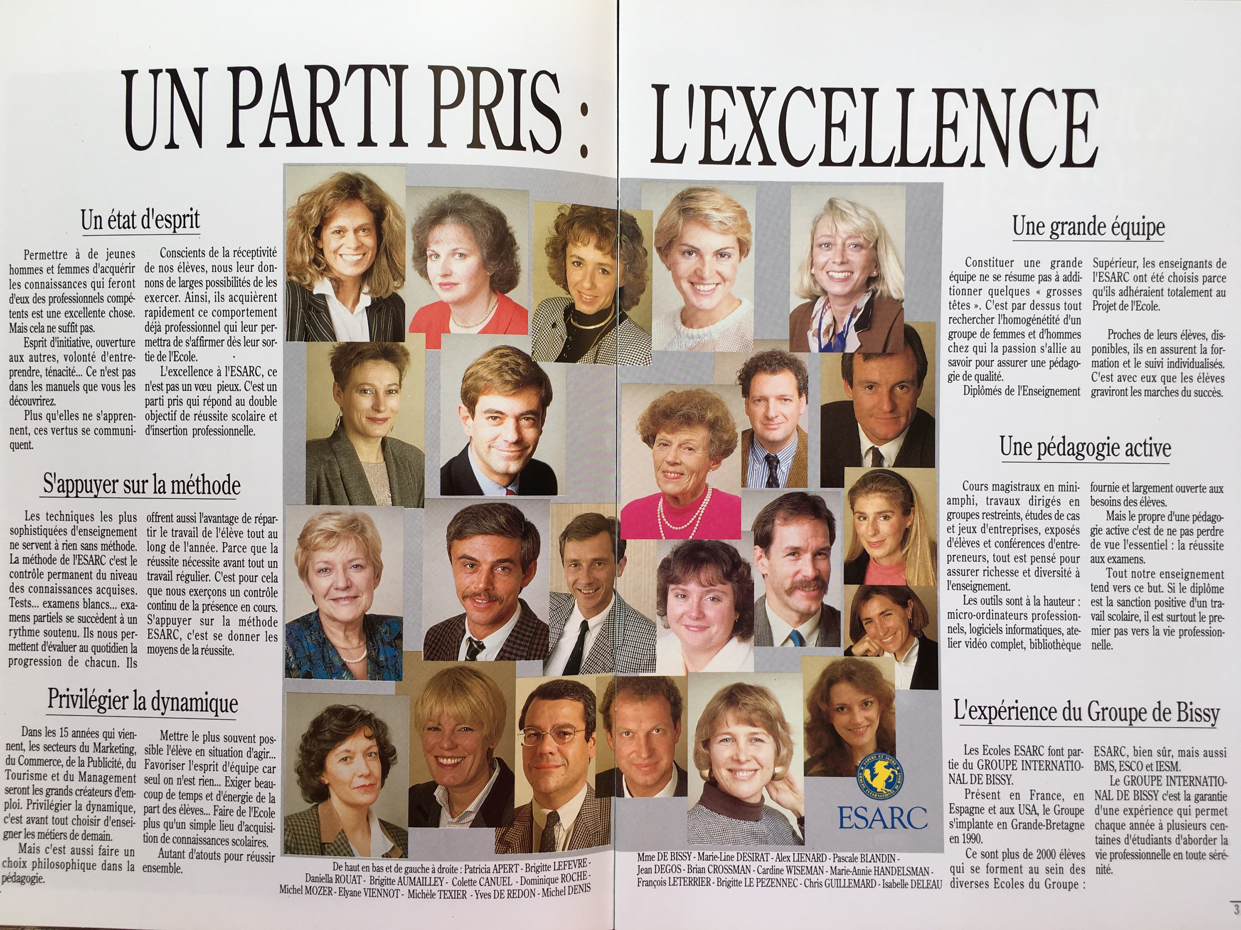 Article de presse de 1992.